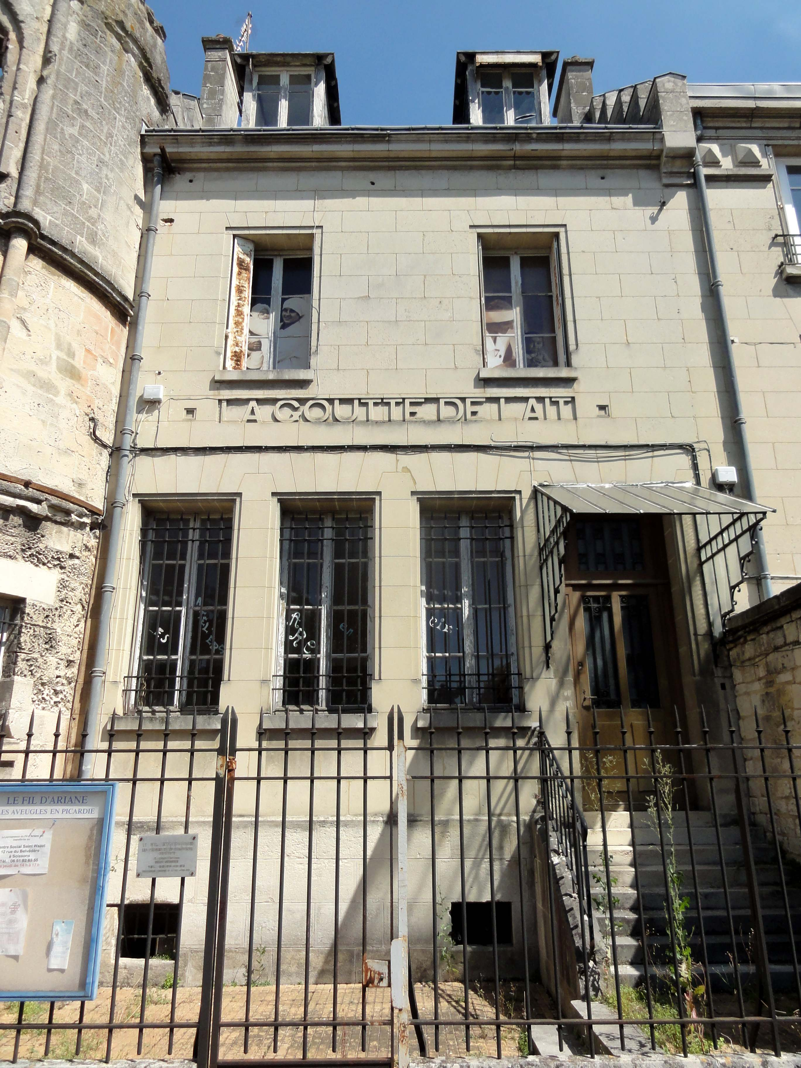 Maison de l'œuvre « La Goutte de lait », place Mantoue.